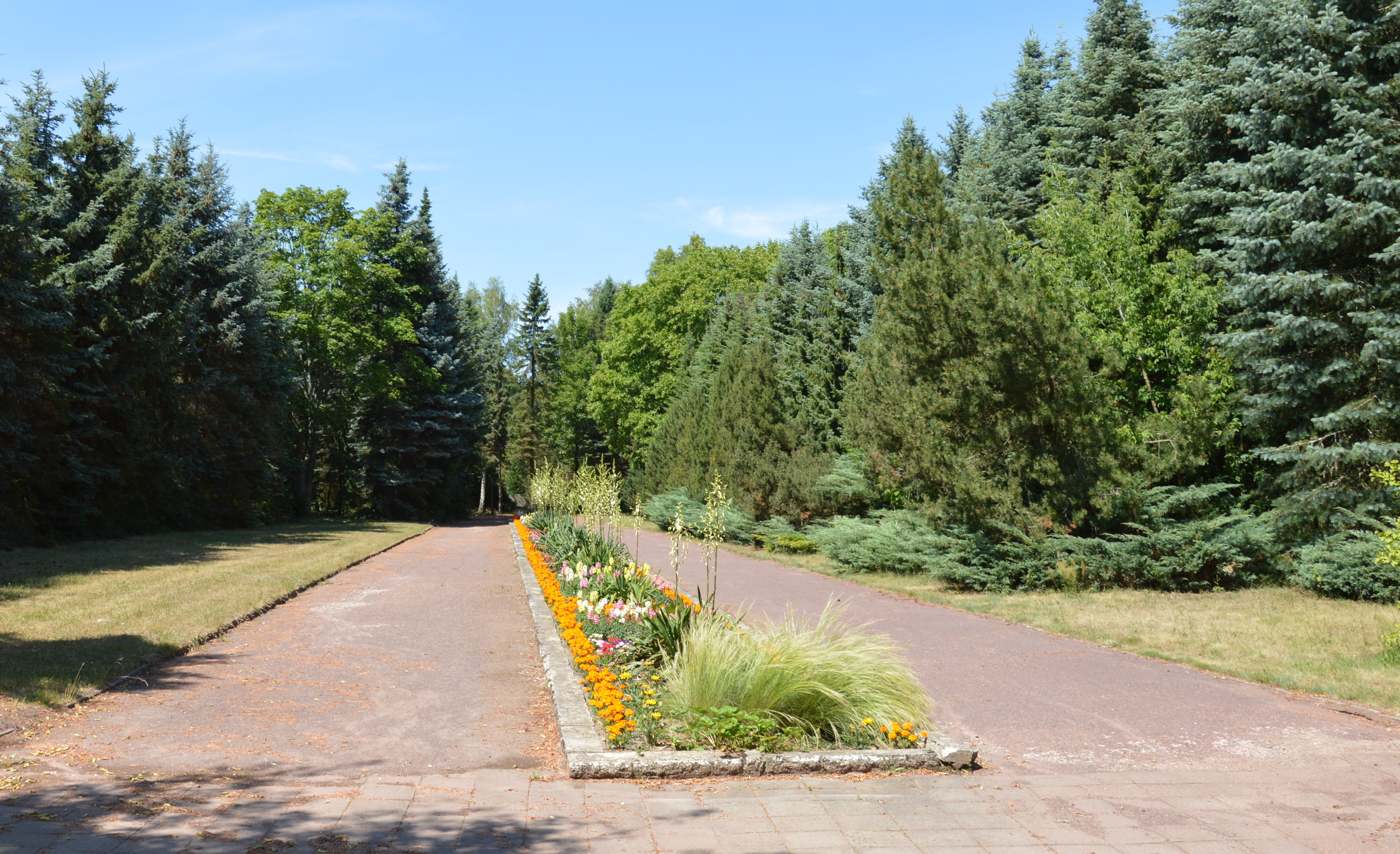 Ostfriedhof Burg Rabatte